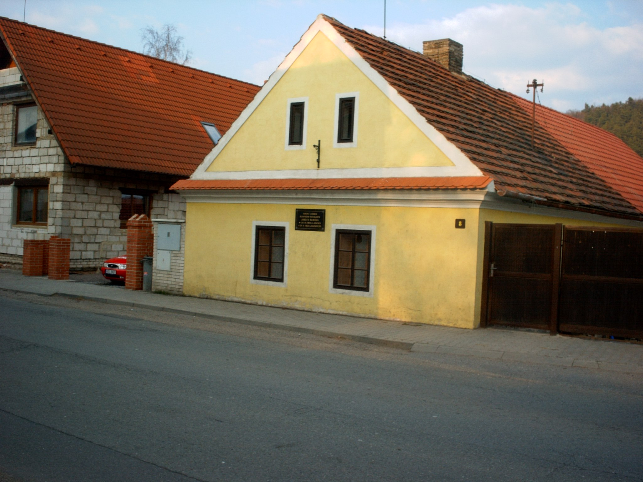 Rodný dům Houslisty J. Slavíka (1806 - 1833) s pamětní deskou, Jince